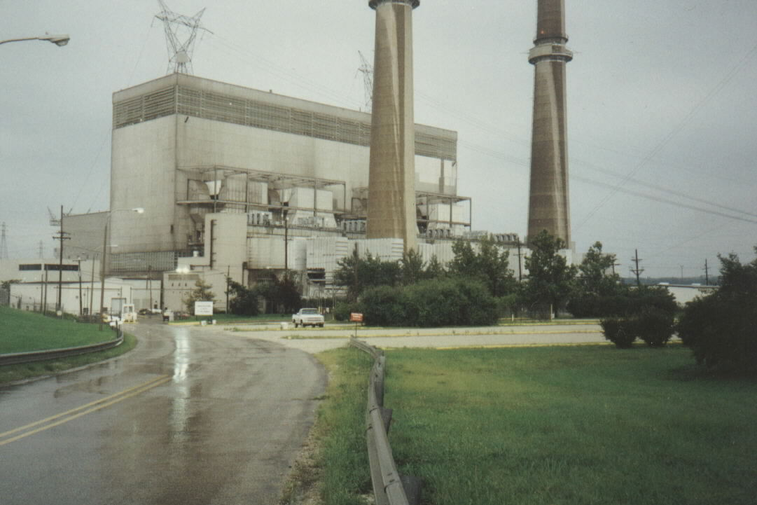 Power plant Joliet, IL. 1993